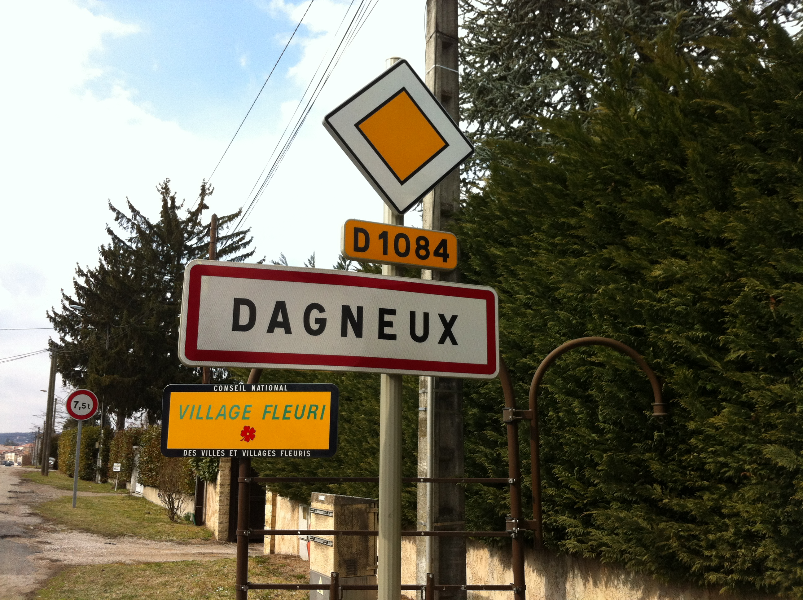 Panneau d'entrée Dagneux.